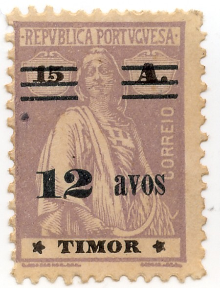 Briefmarke von Portugiesisch-Timor mit der Göttin Ceres. Ab 1910 im Gebrauch. aktualisierter Wert von 15 auf 12 Avos